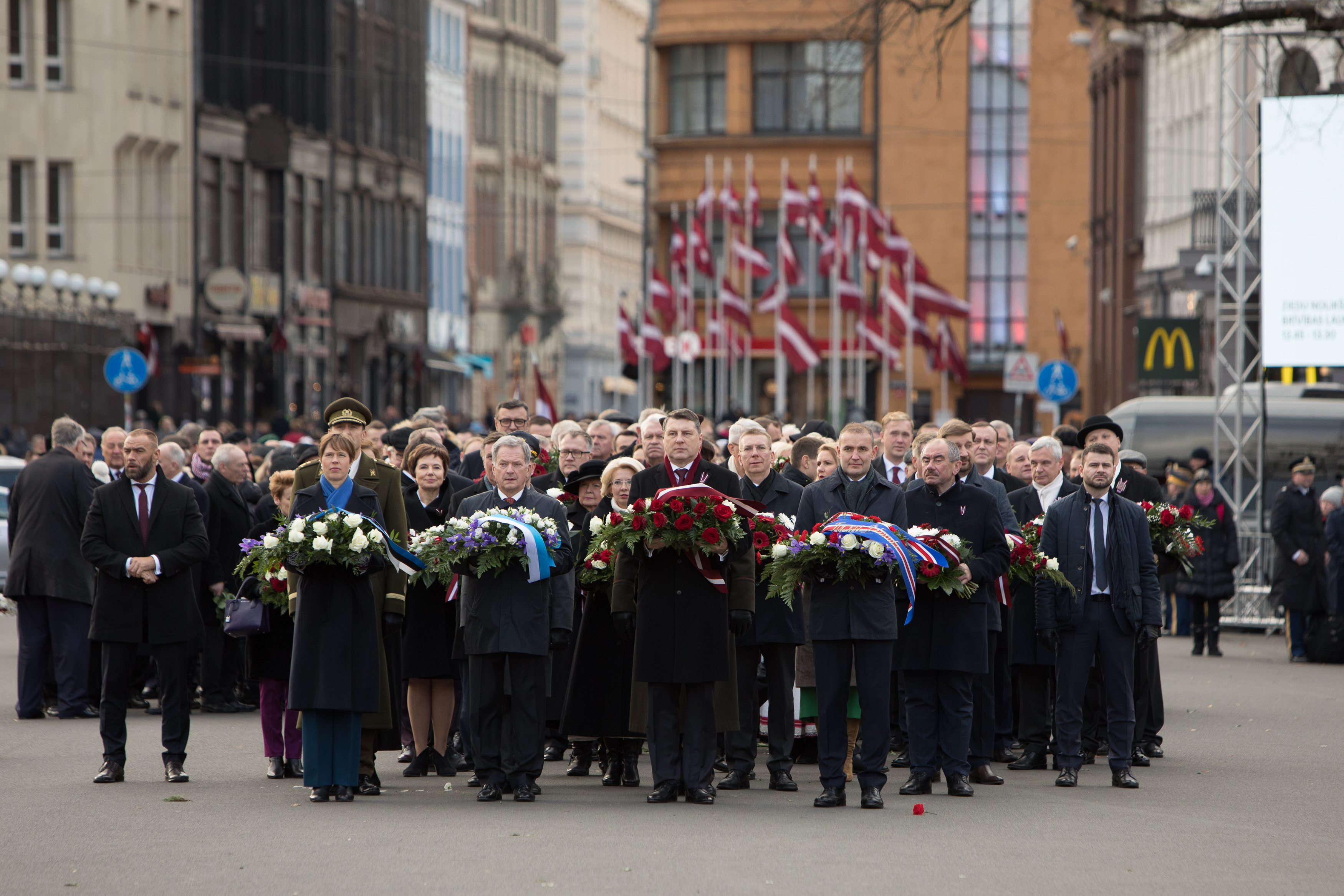 2018.gada 18.novembris. Latvijas Republikas proklamēšanas simtajai gadadienai veltītā ziedu nolikšanas ceremonija pie Brīvības pieminekļa. Foto: Ernests Dinka, Saeima Izmantošanas noteikumi: saeima.lv/lv/autortiesibas